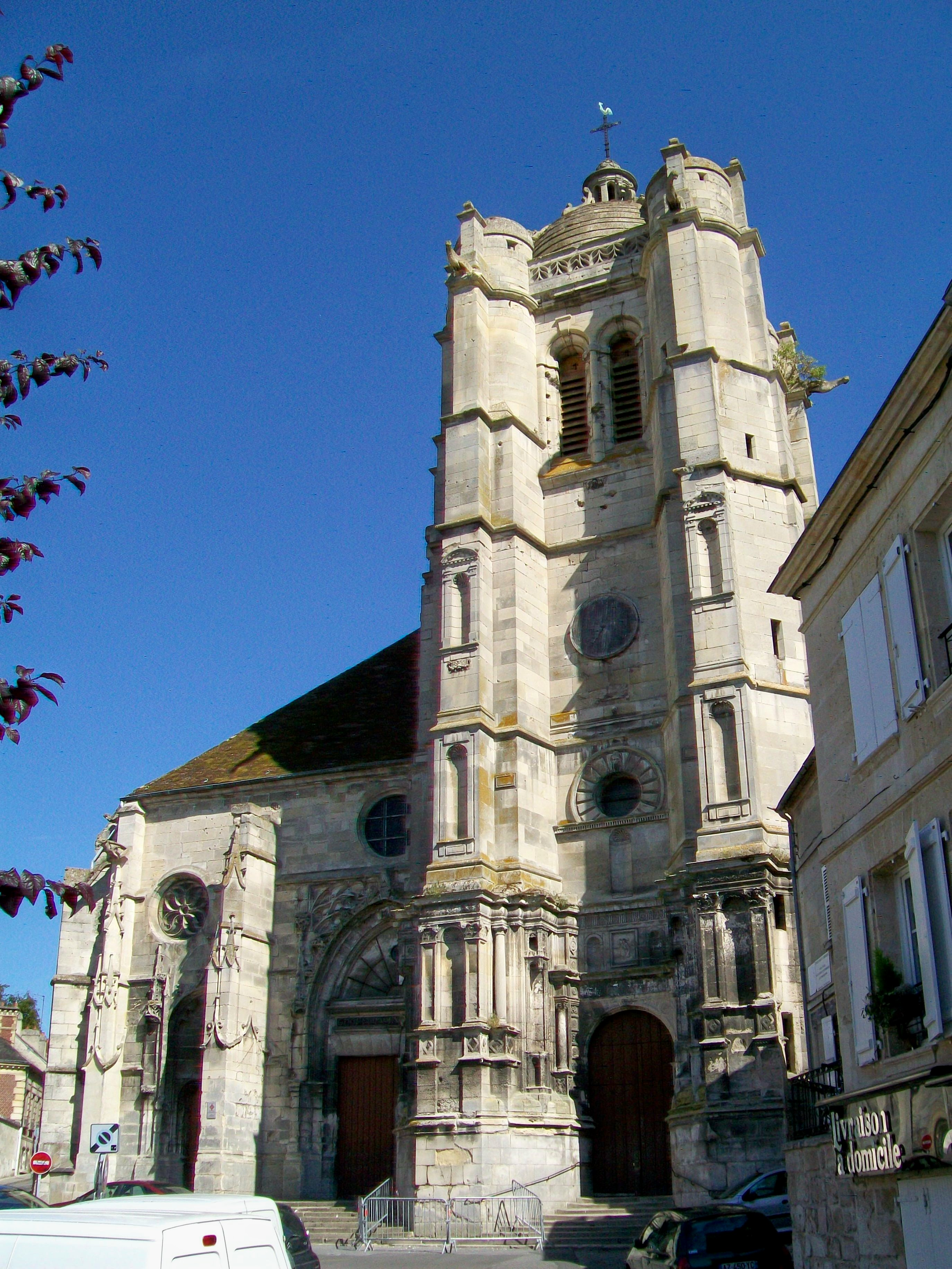 Le clocher et le portail de l'église Sainte-Maxence, depuis l'ouest.